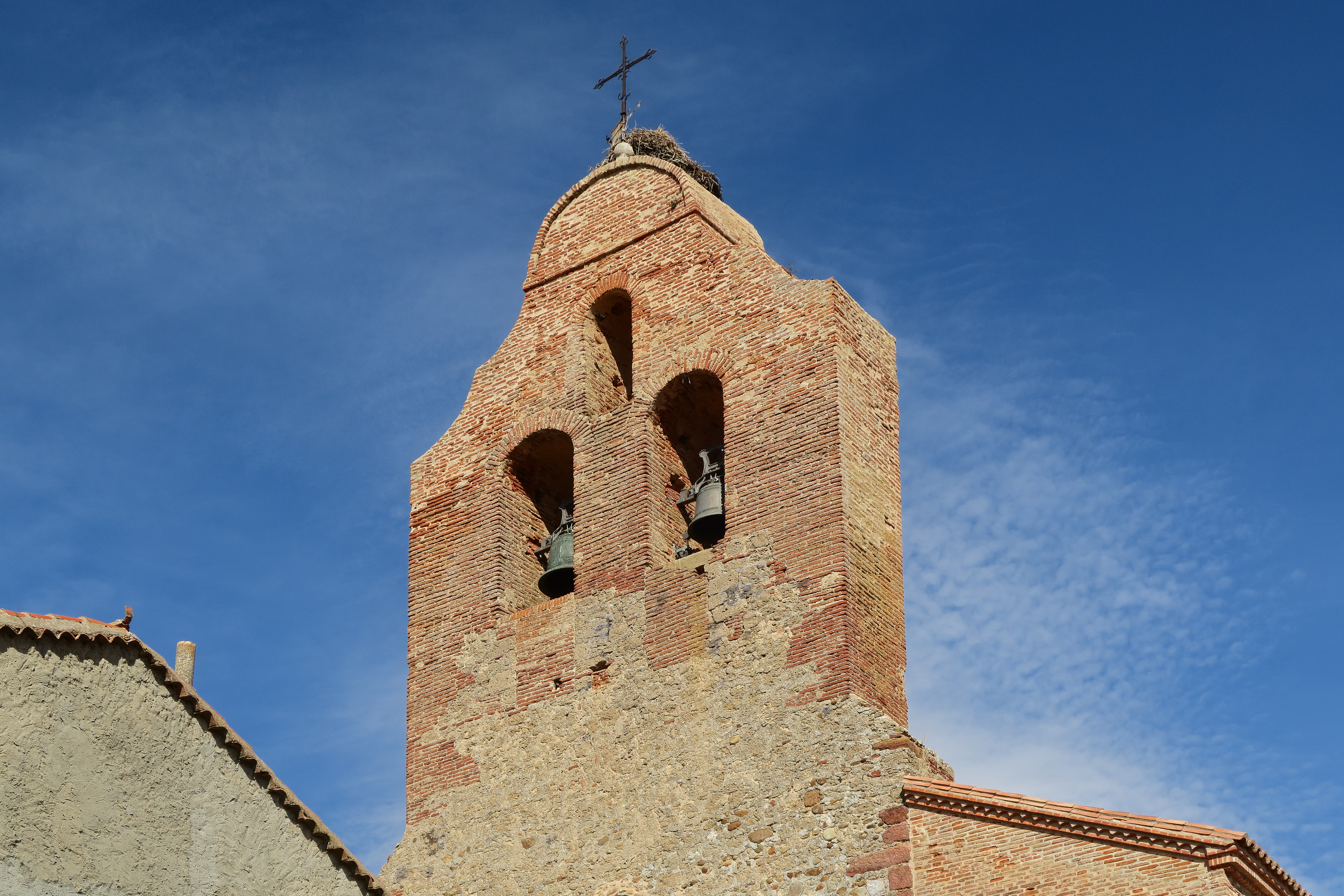 Arquillinos, Iglesia de San Tirso, espadaña, 02